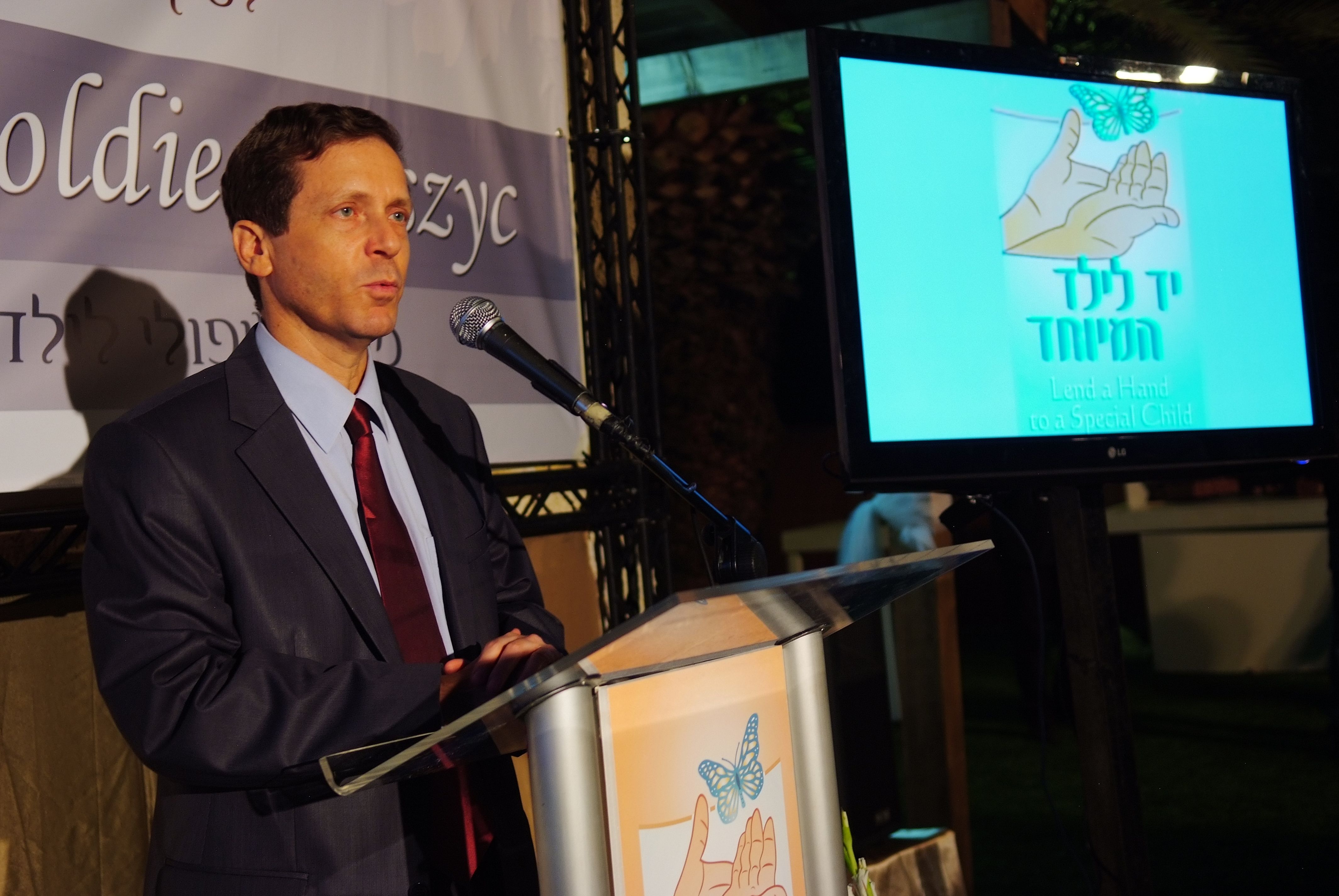 שר הרווחה בוזי הרצוג חונך את המרכז הטיפולי (2010)